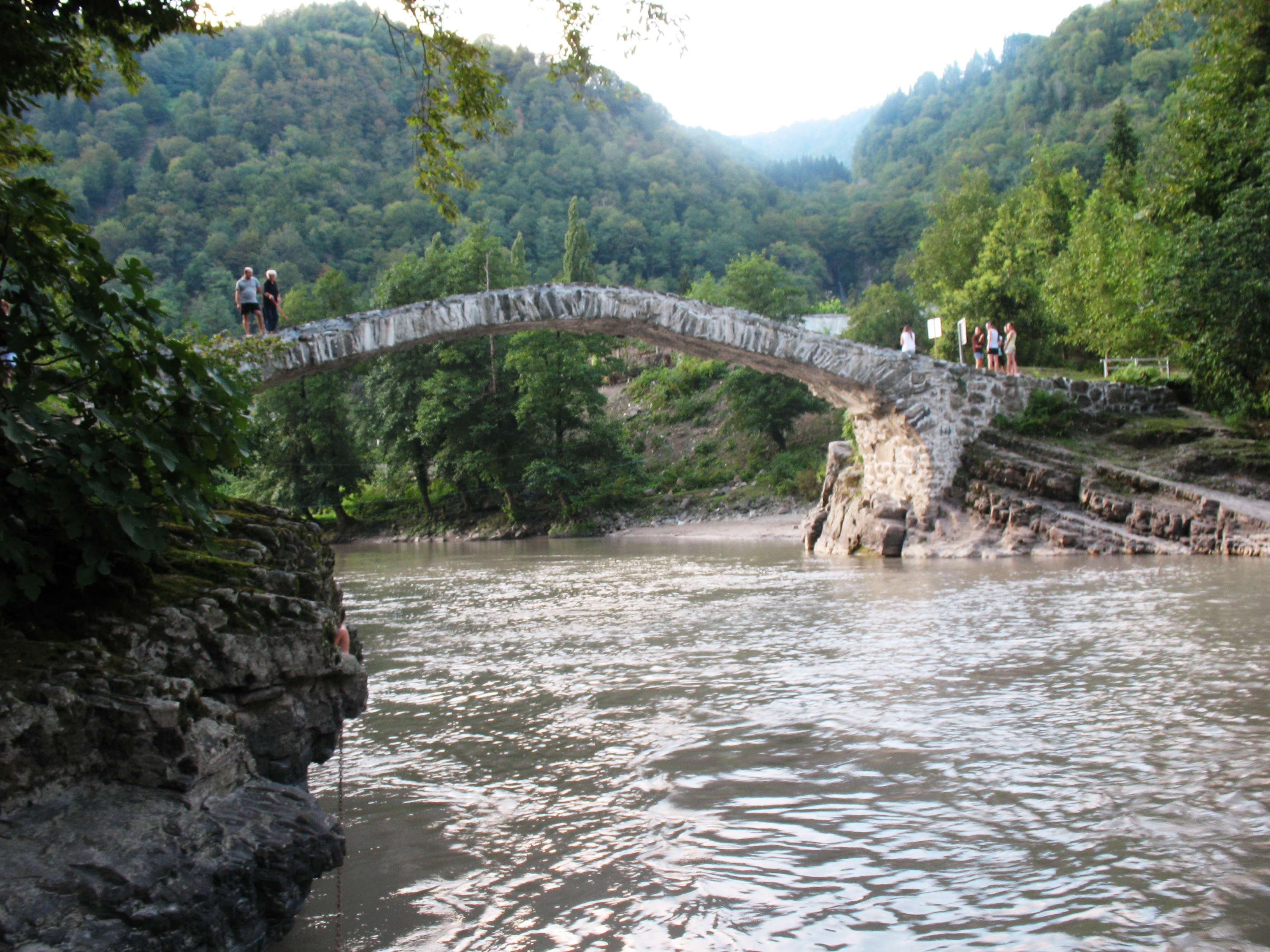 თამერ მეფის ხიდი მახუნცეთთან